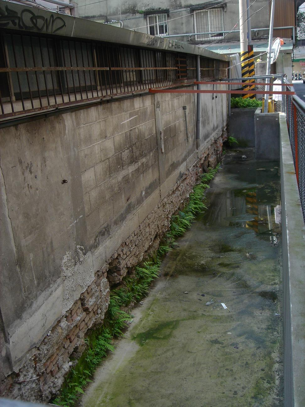 新北市永和區復興商工後方的浮圳仔遺址